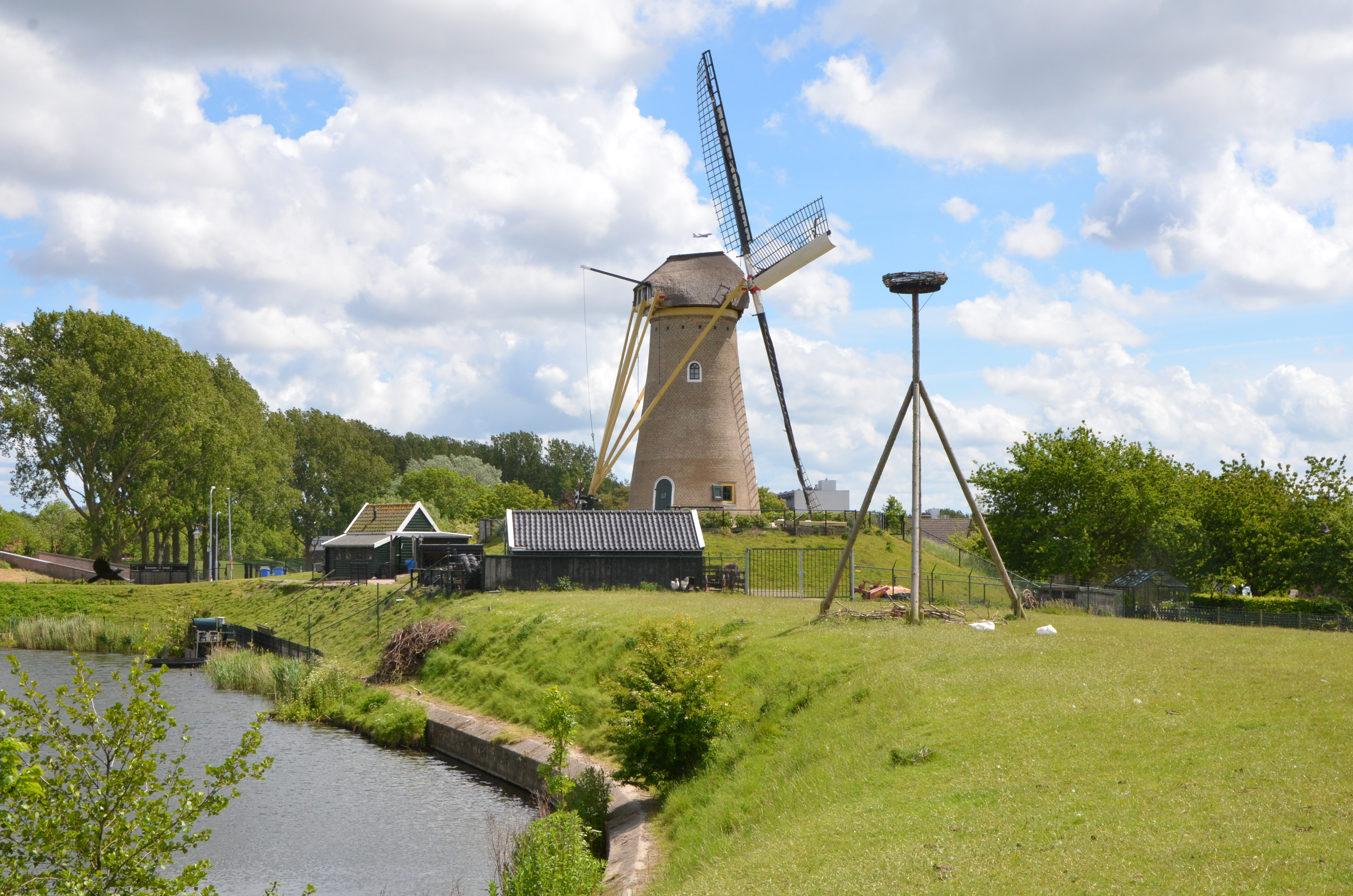 Hoofddorp, Netherlands